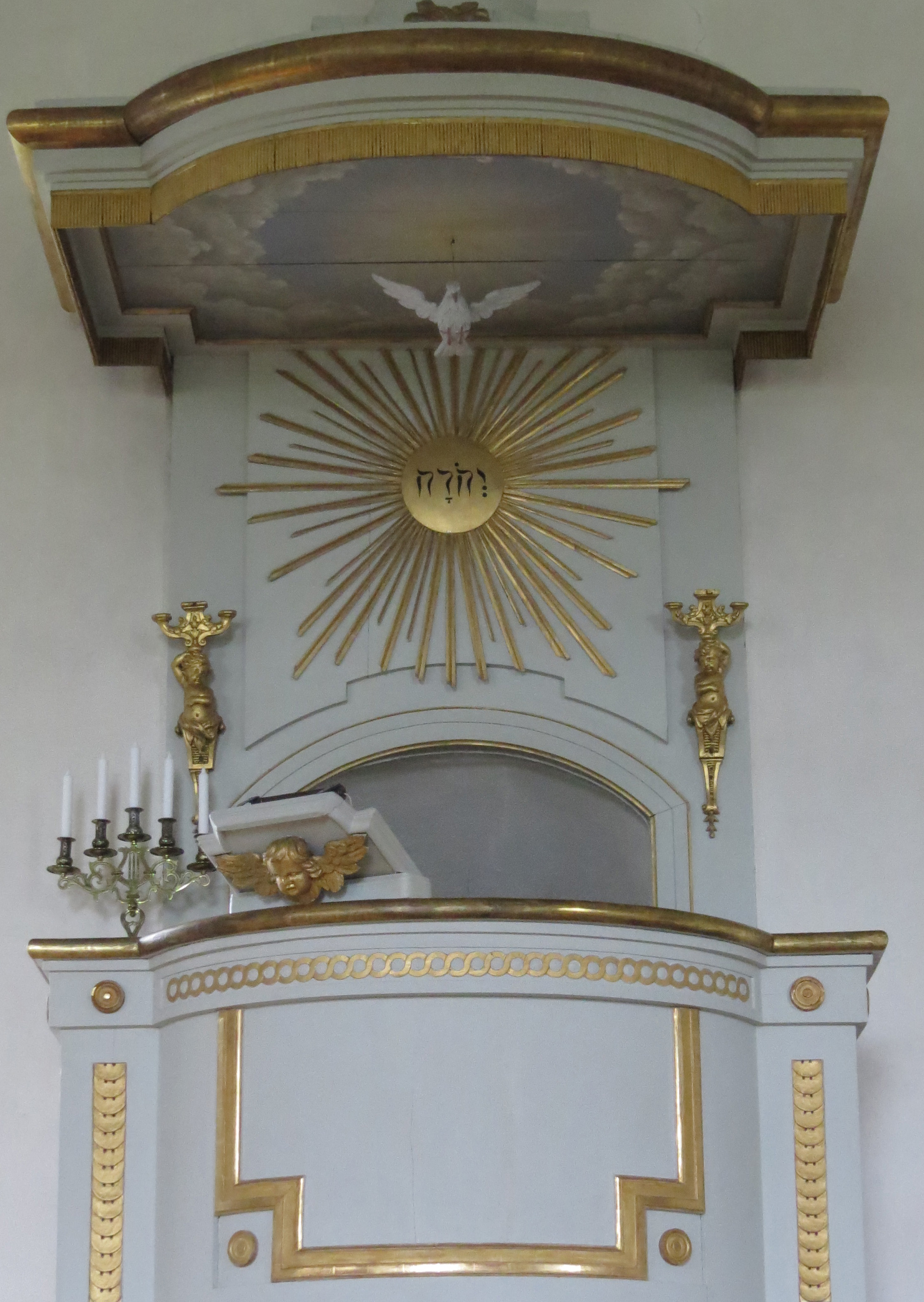 Predikstol från 1783 i Vingstads kyrka